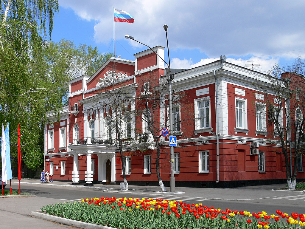 Budova městské dumy (rady) v Barnaulu, Rusko